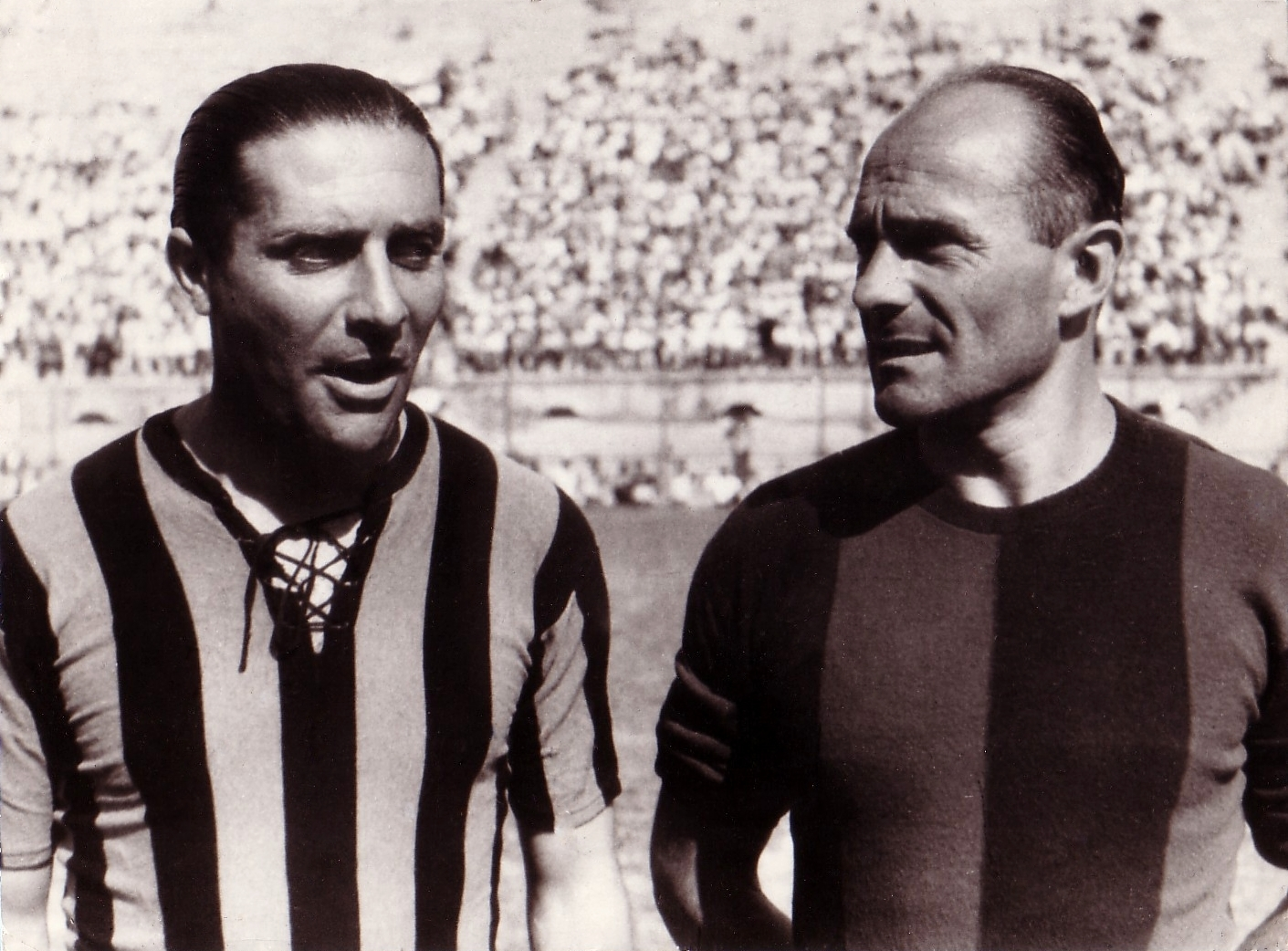 Giuseppe "Peppino" Meazza (Inter) e Amedeo Biavati (Bologna), insieme campioni del mondo nel 1938, qui nel 1946 capitani delle loro squadre di club.